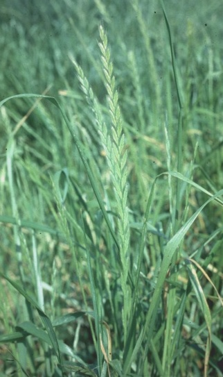 Particolare della pianta in spigatura. Foto personale, maggio 2006.